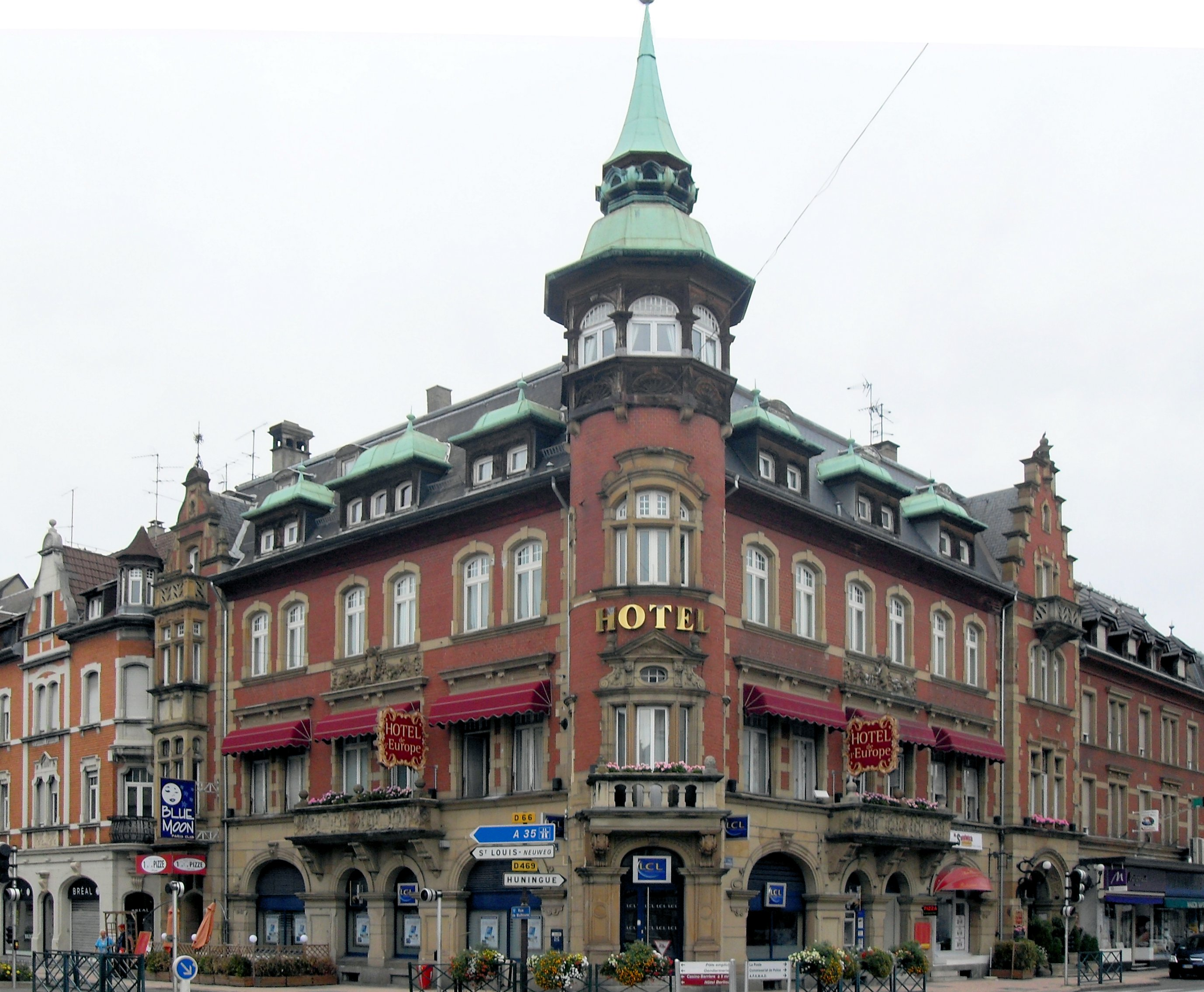 L'hôtel de l'Europe à Saint-Louis